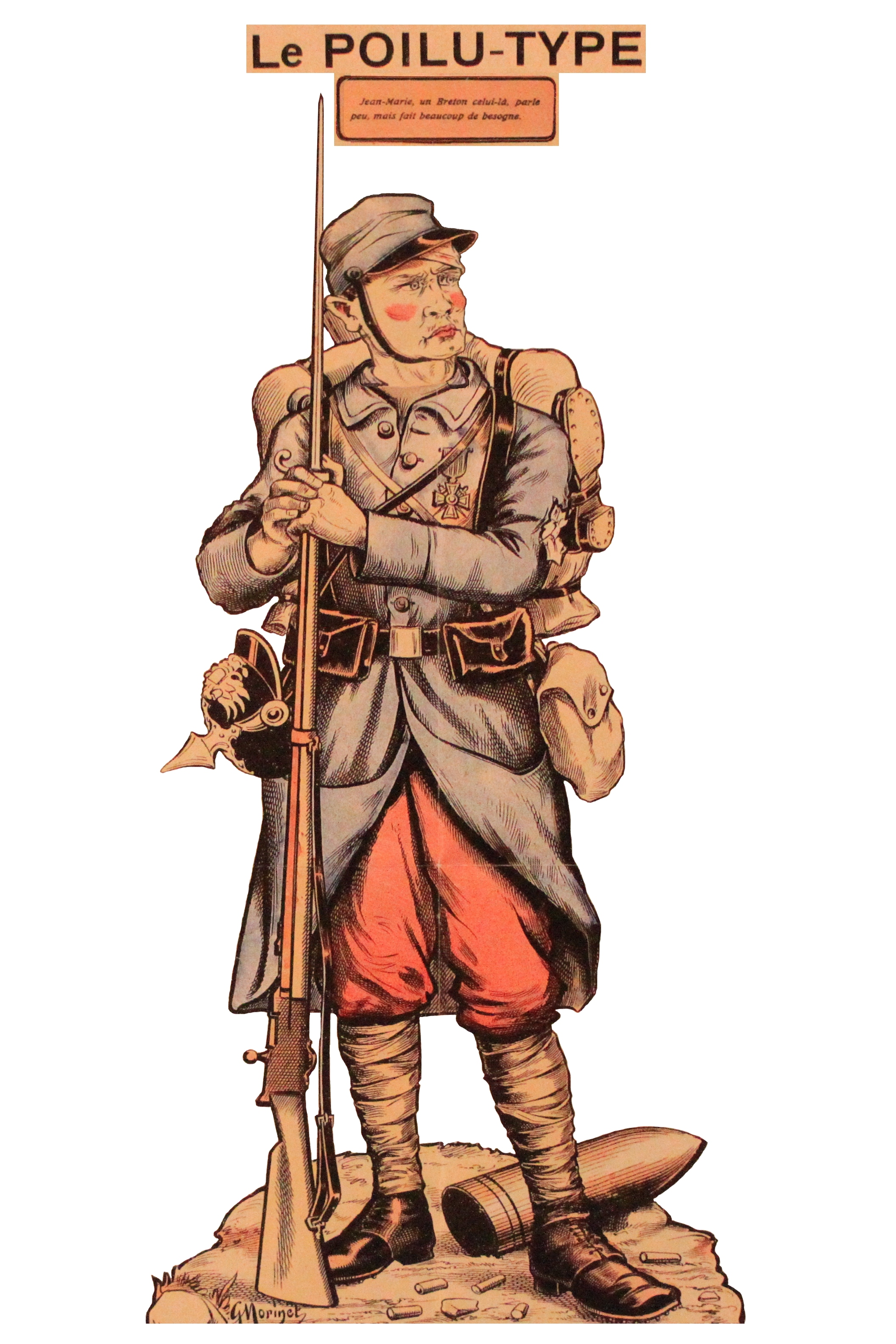 Découpages Pellerin : Imagerie d'Épinal n°17 (tirettes) - série de guerre (1915) : le Poilu type, le Breton (découpage-collage numérique d'après file:W2289-Affiche14-18 PoiluType 0 94926.JPG).